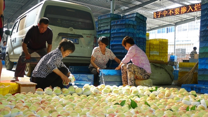 無錫陽山鎮特產水蜜桃